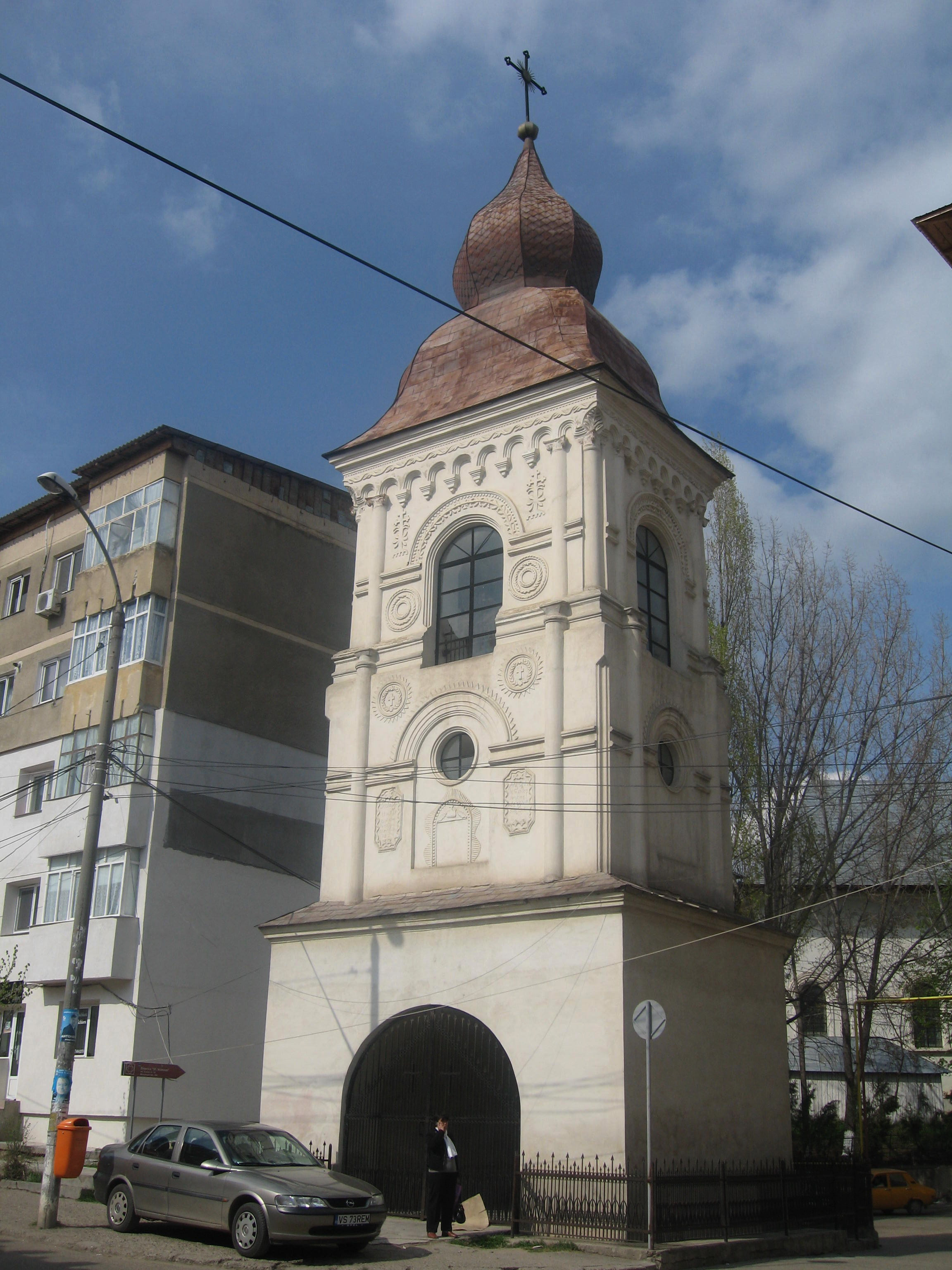 Biserica Sfinții Voievozi din Huși 02